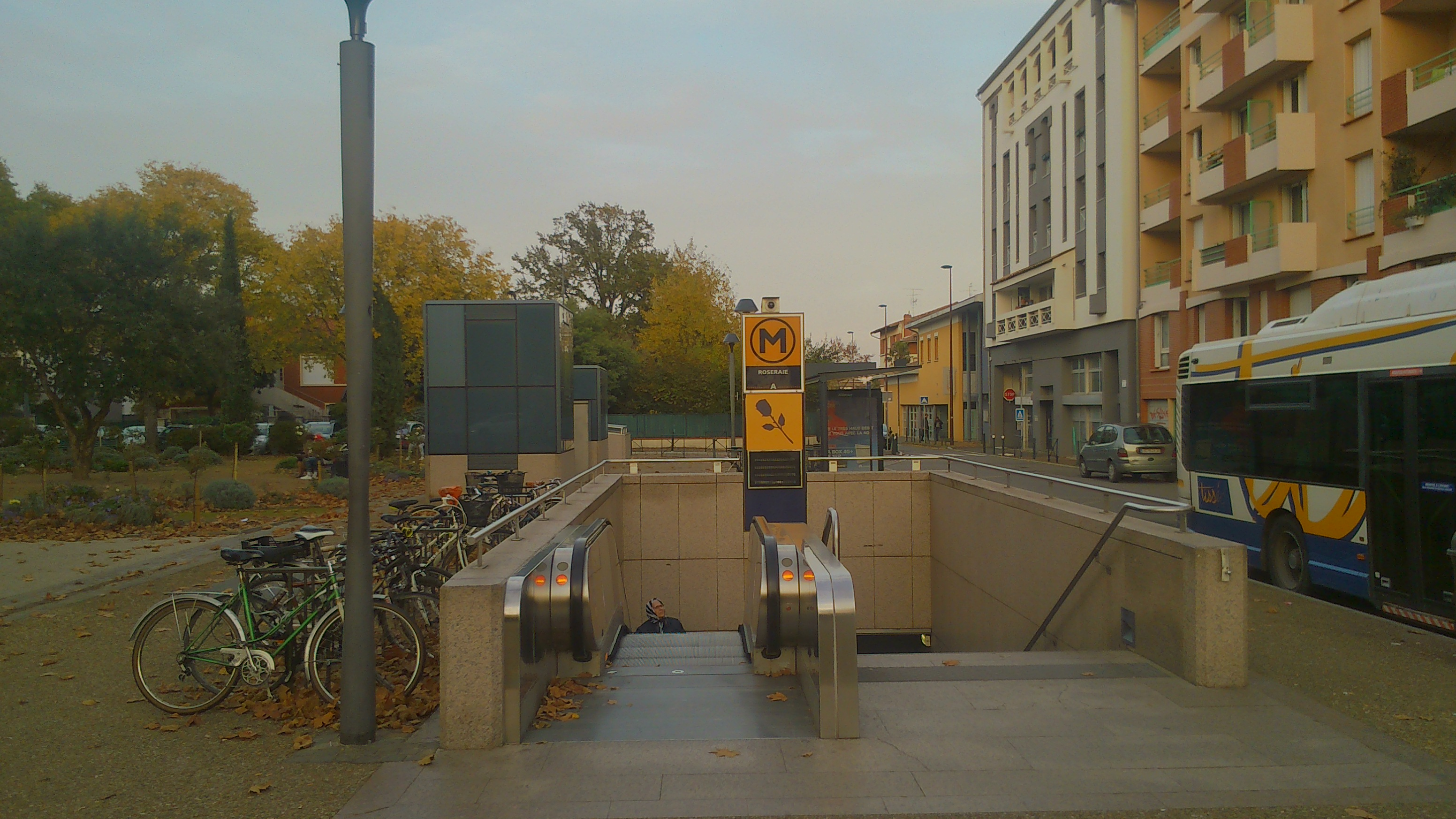 La station Roseraie du métro de Toulouse.